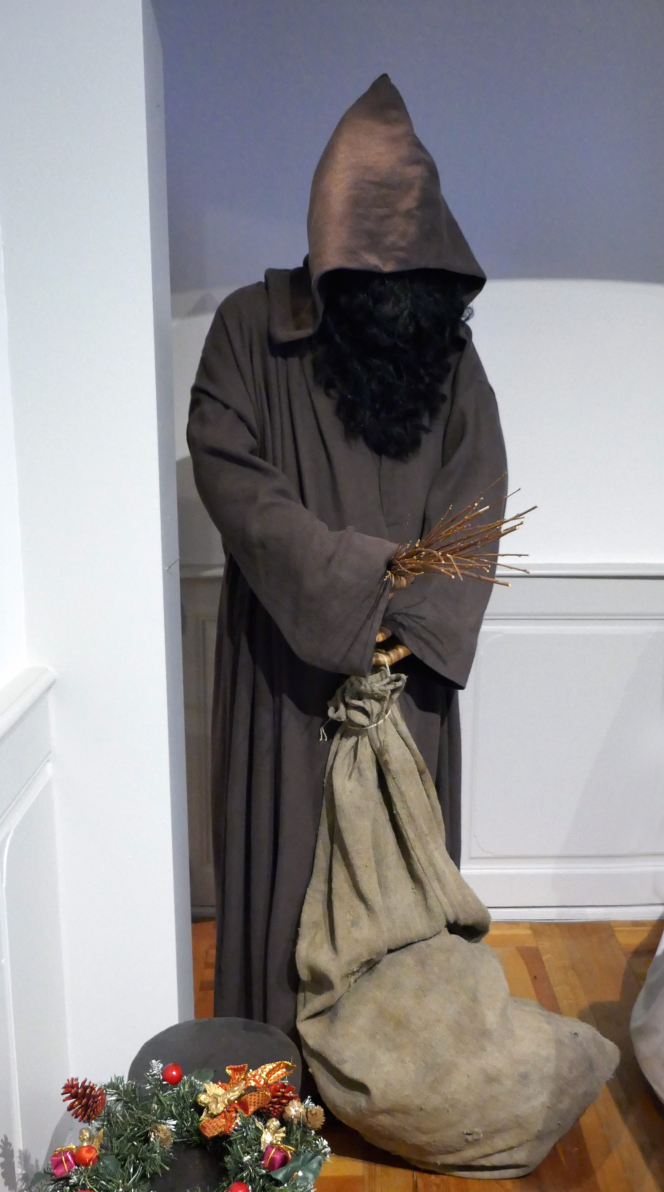 Représentation du Hans Trapp au Musée alsacien de Strasbourg. Exposition temporaire Costumes d'Alsace, étoffes d'un monde au Musée alsacien de Strasbourg (2018).